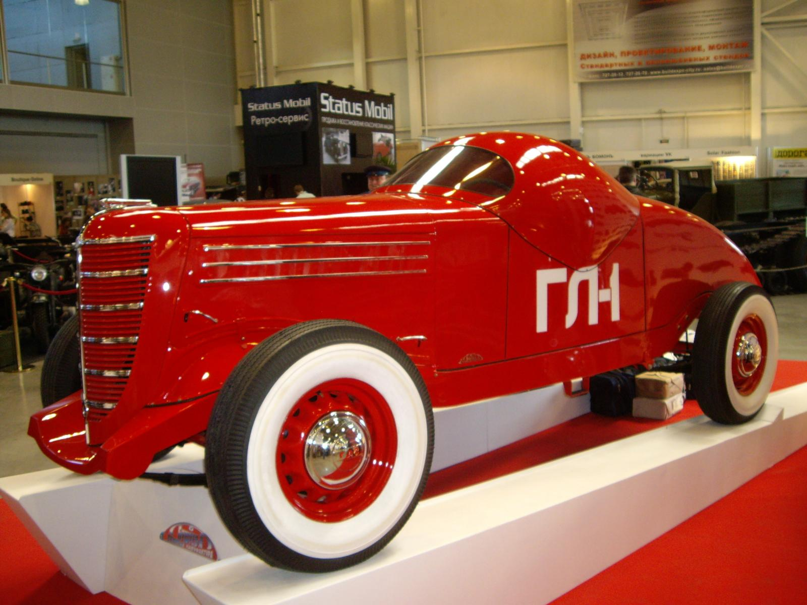 GAZ GL-1 race car